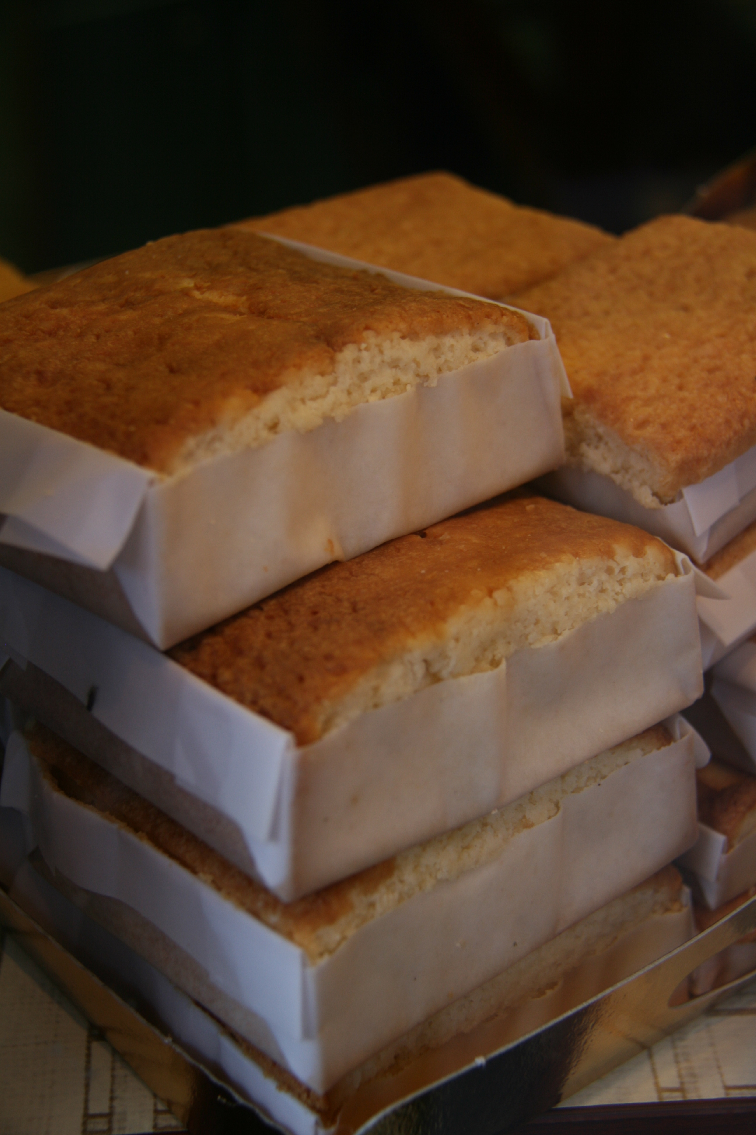 Sobaos